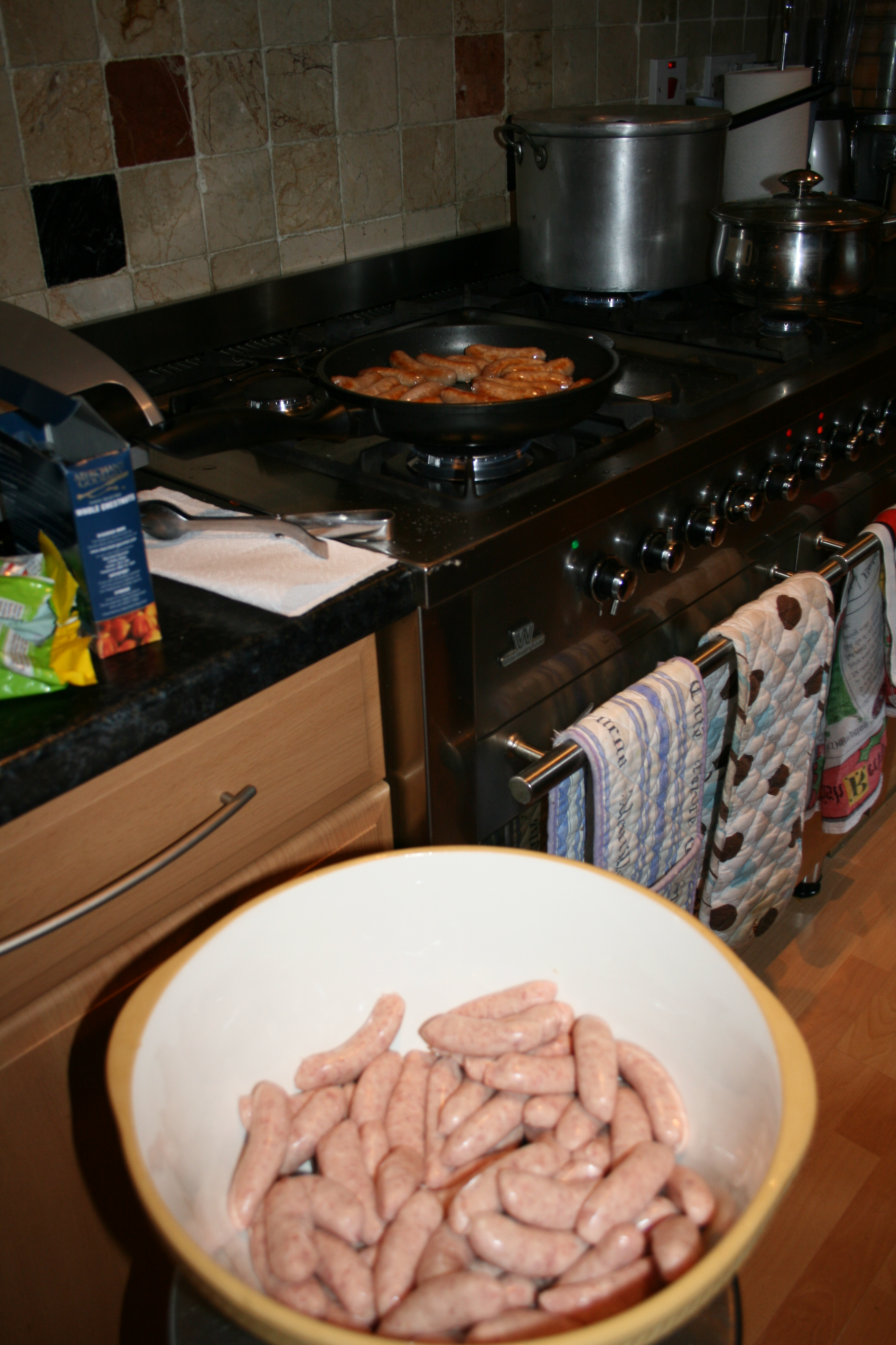 Chipolatas